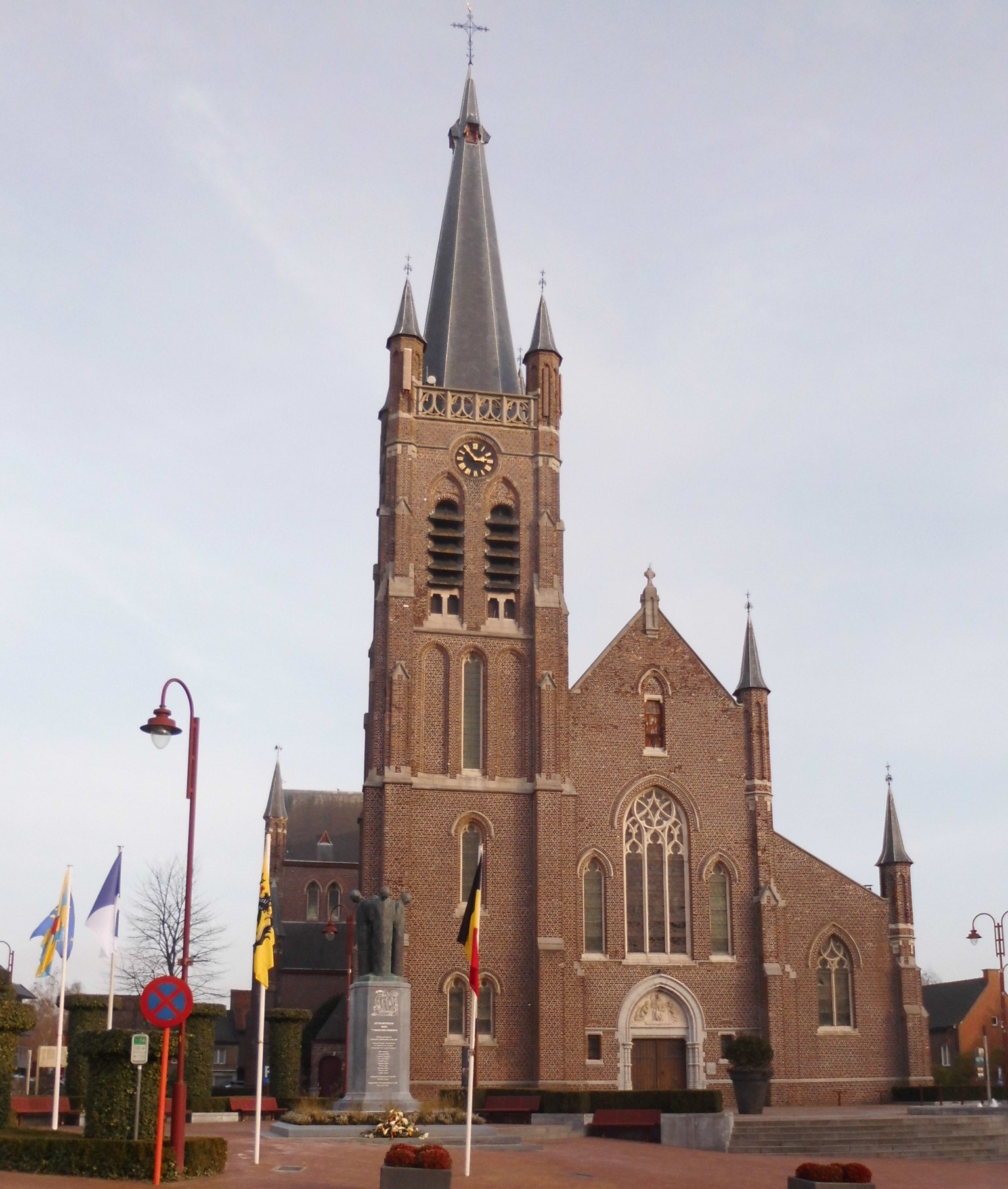 Oorlogsmonument voor de slachtoffer van de beide Wereldoorlogen - Kerkplein - Lichtervelde - West-Vlaanderen - België